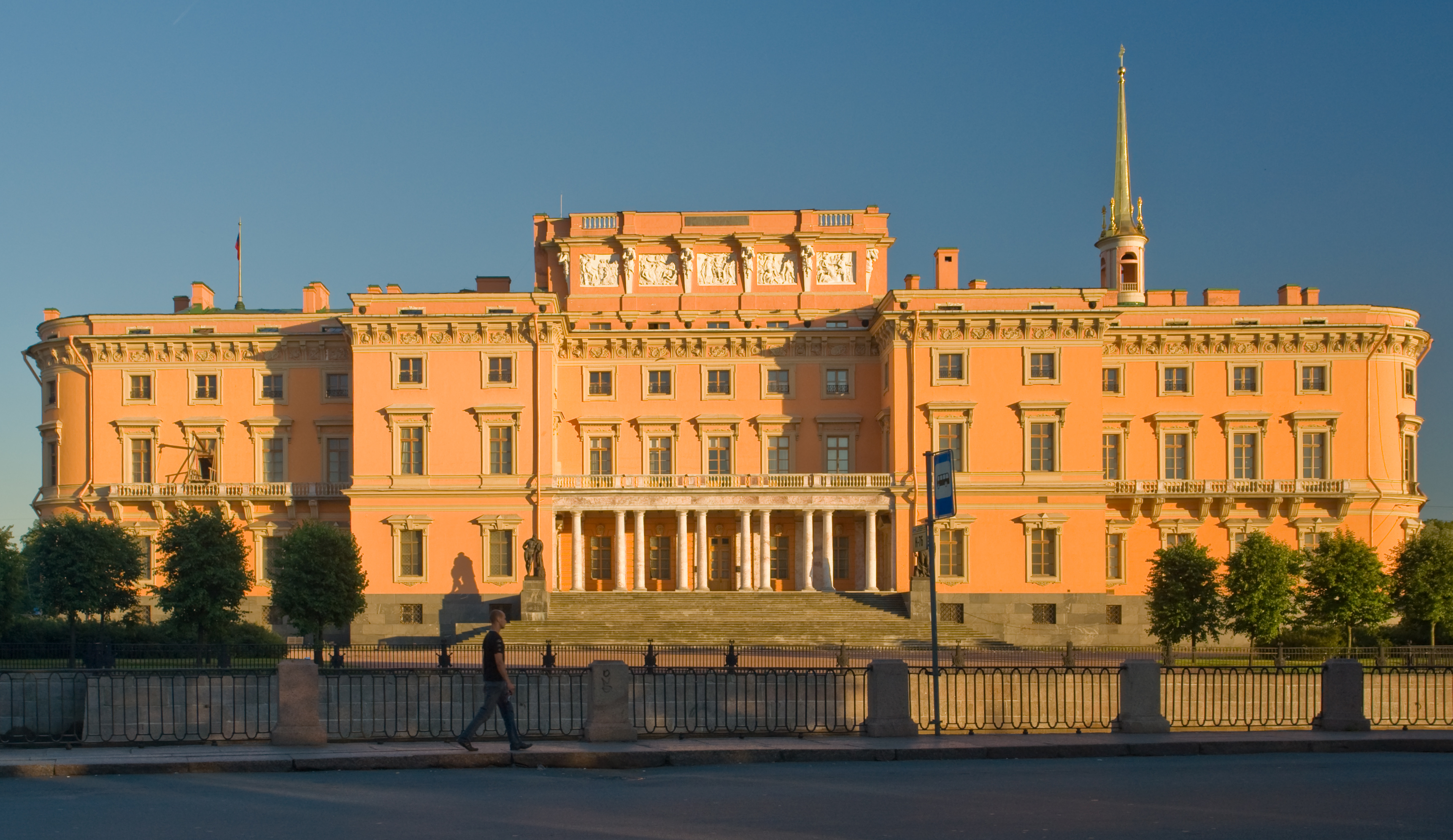 Михайловский замок. Вид с Летнего сада. (Санкт-Петербург, Россия)